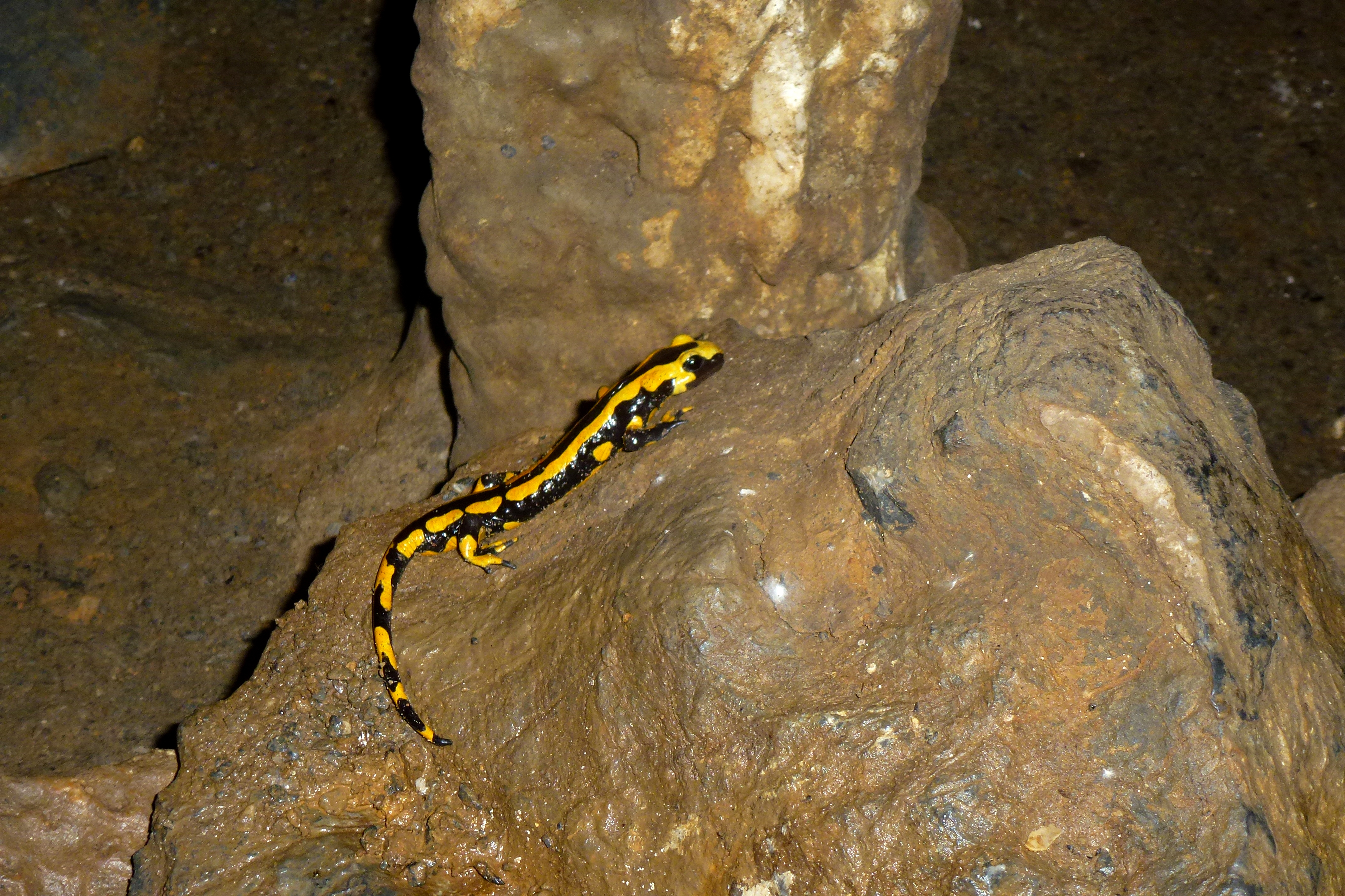 Feuersalamander als Bewohner der Bilsteinhöhle